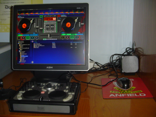 emisora de Balaguer:Ràdio Conecta